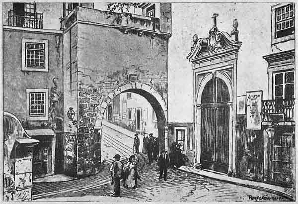 Esta imagem (em domínio público por morte do autor há mais de 75 anos) faz parte de um conjunto de 100 aguarelas e gravuras criadas em 1910-1920 e publicadas no livro Lisboa Velha (Afonso Lopes Vieira (prefácio). Anuário Comercial: Lisboa, 1925).